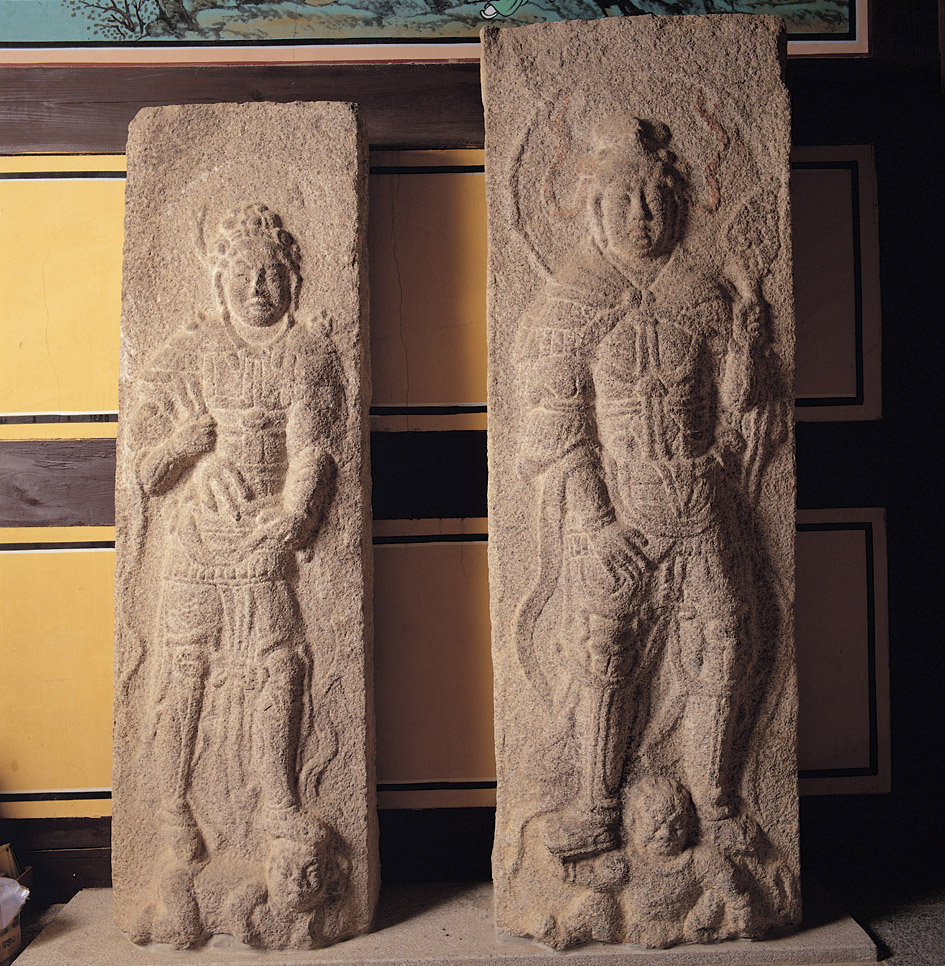 보물 제318호 청도 운문사 석조사천왕상 (淸道 雲門寺 石造四天王像) - 사천왕석주 중 남방 증장천왕상과 서방 광목천왕상